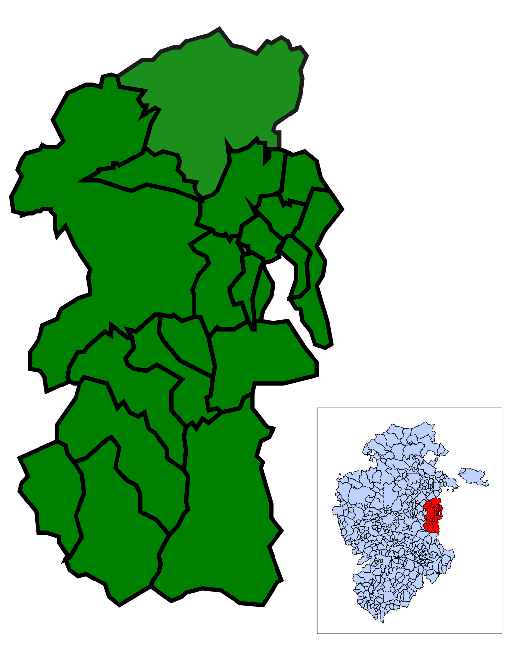 Municipios de la Riojilla Burgalesa